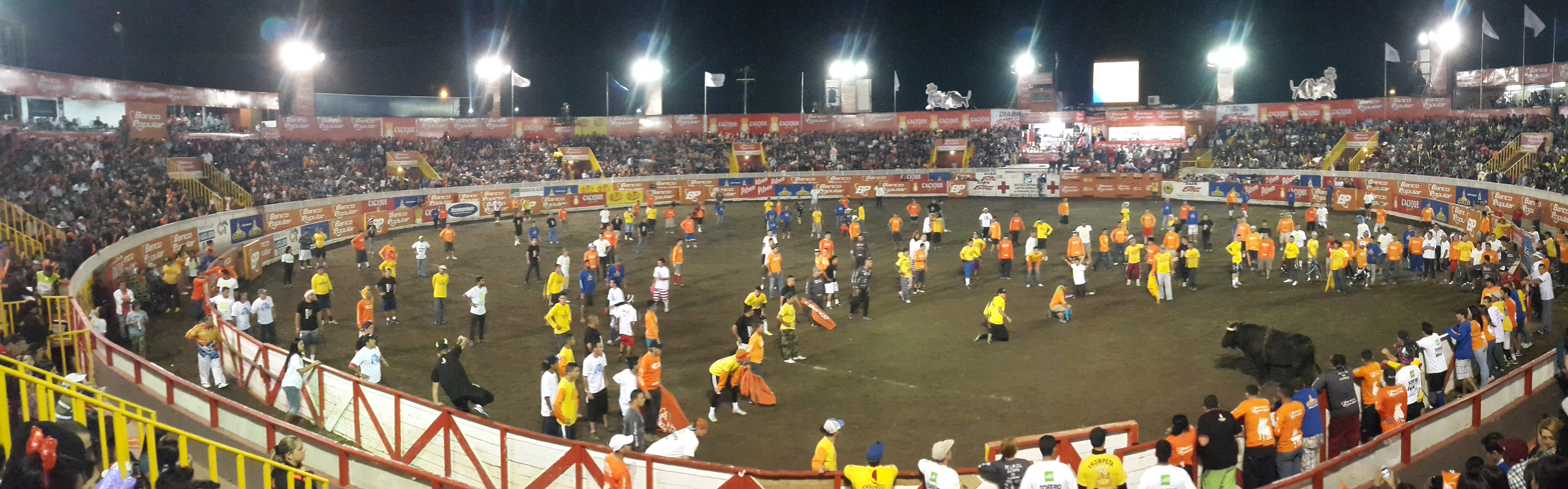 Corrida de toros a la tica en las Fiesta de Zapote, San José, Costa Rica, el 3 de enero de 2015.